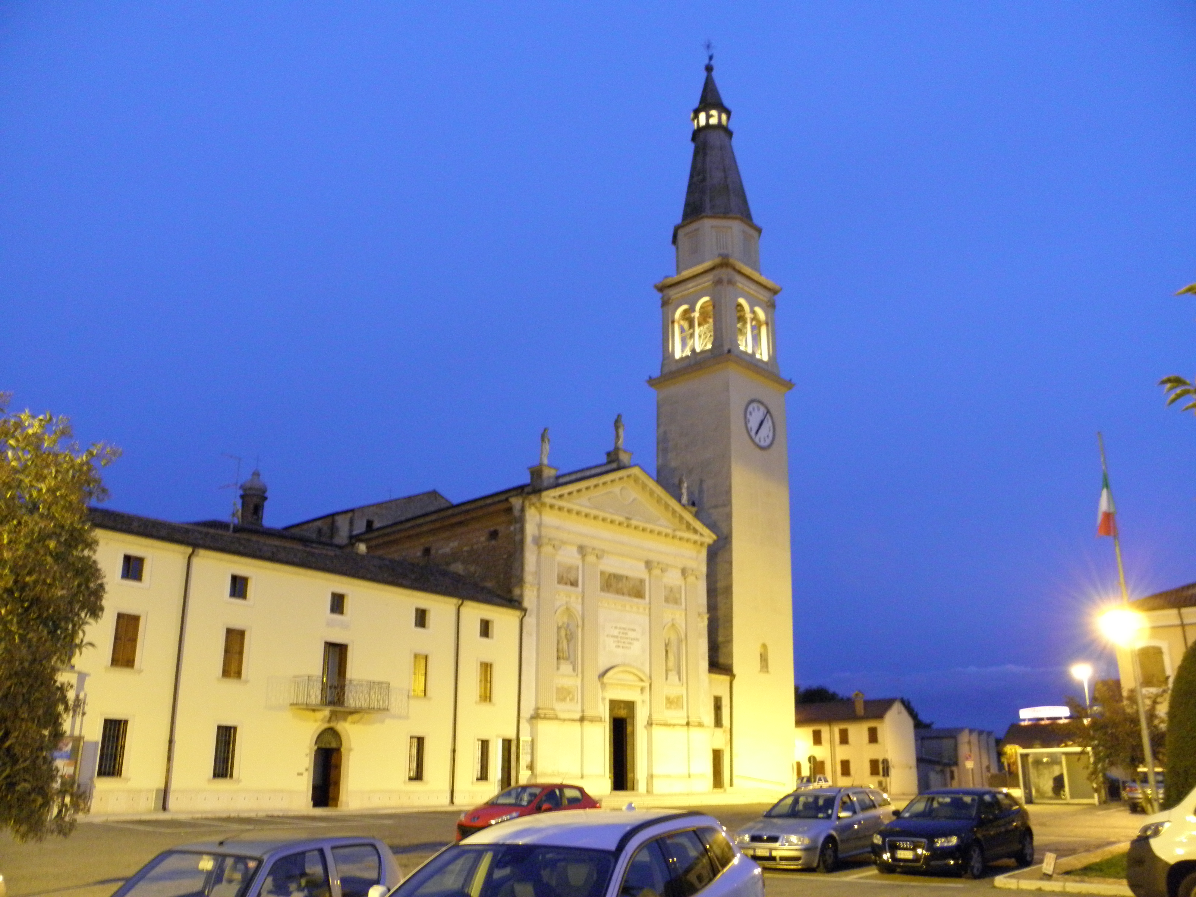 Roverchiara, la chiesa parrocchiale di San Zeno Vescovo in tarda serata.